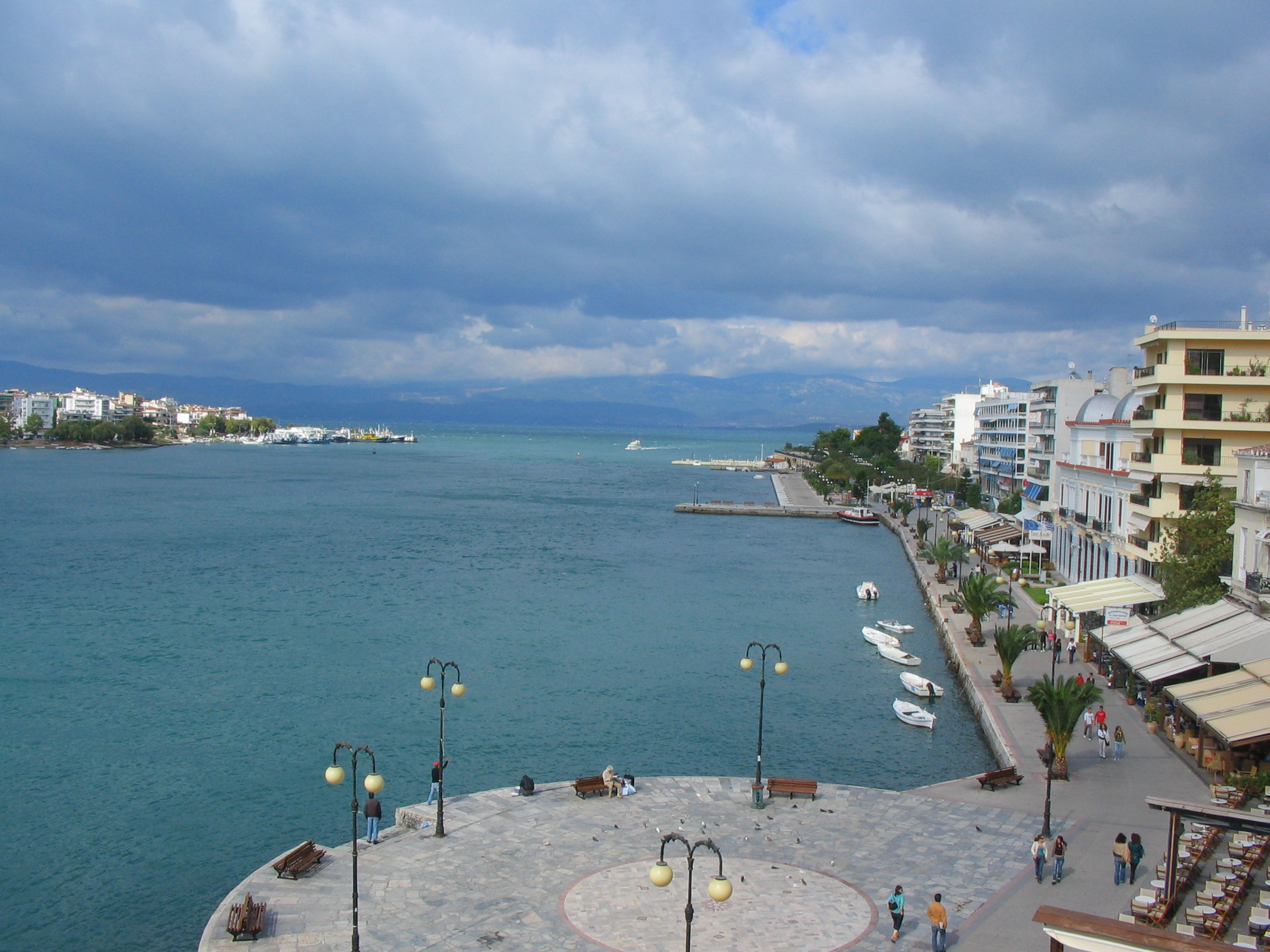 Набережная города Халкиды, Греция, остров Эбея